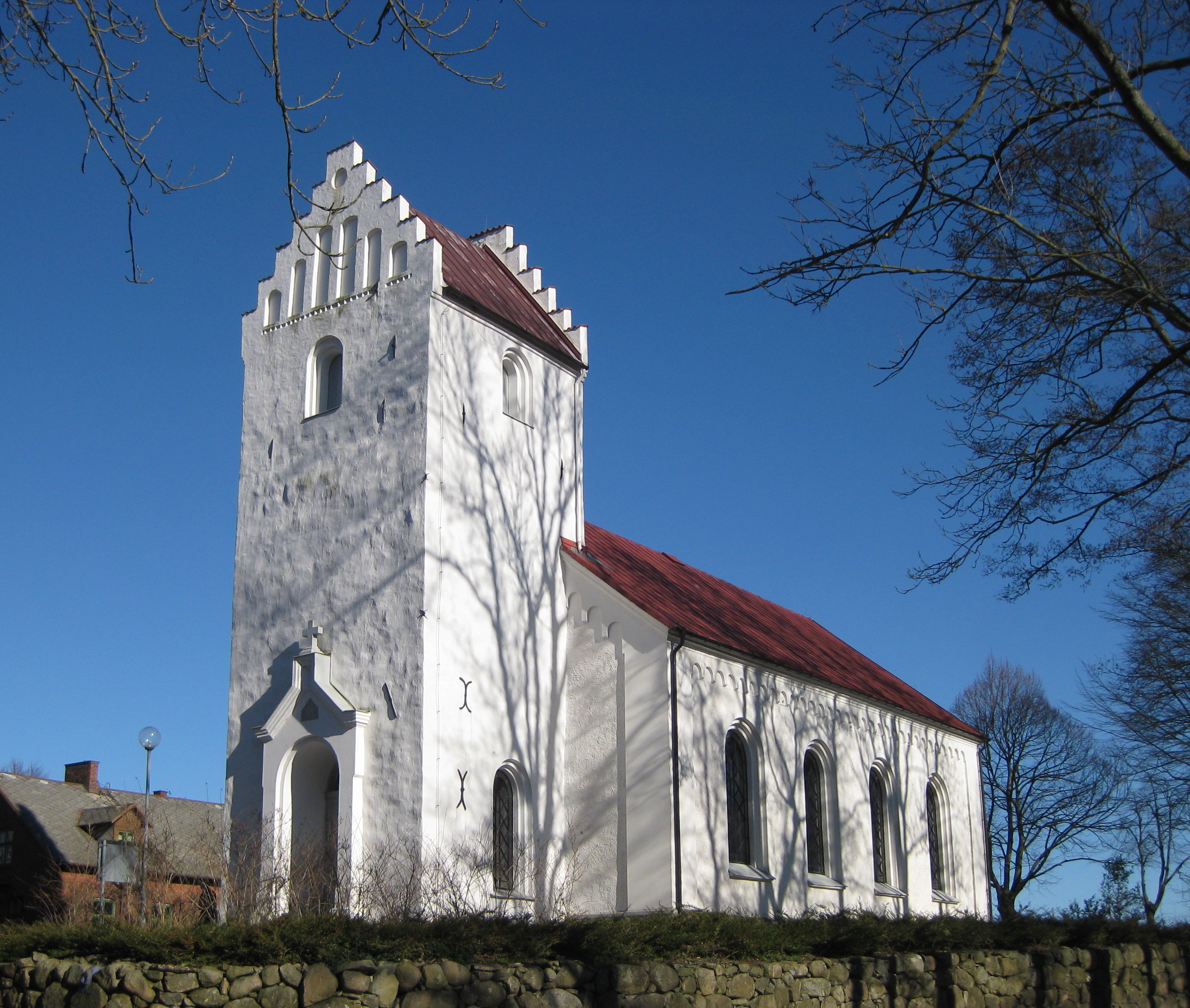 Västra Hoby kyrka i Skåne